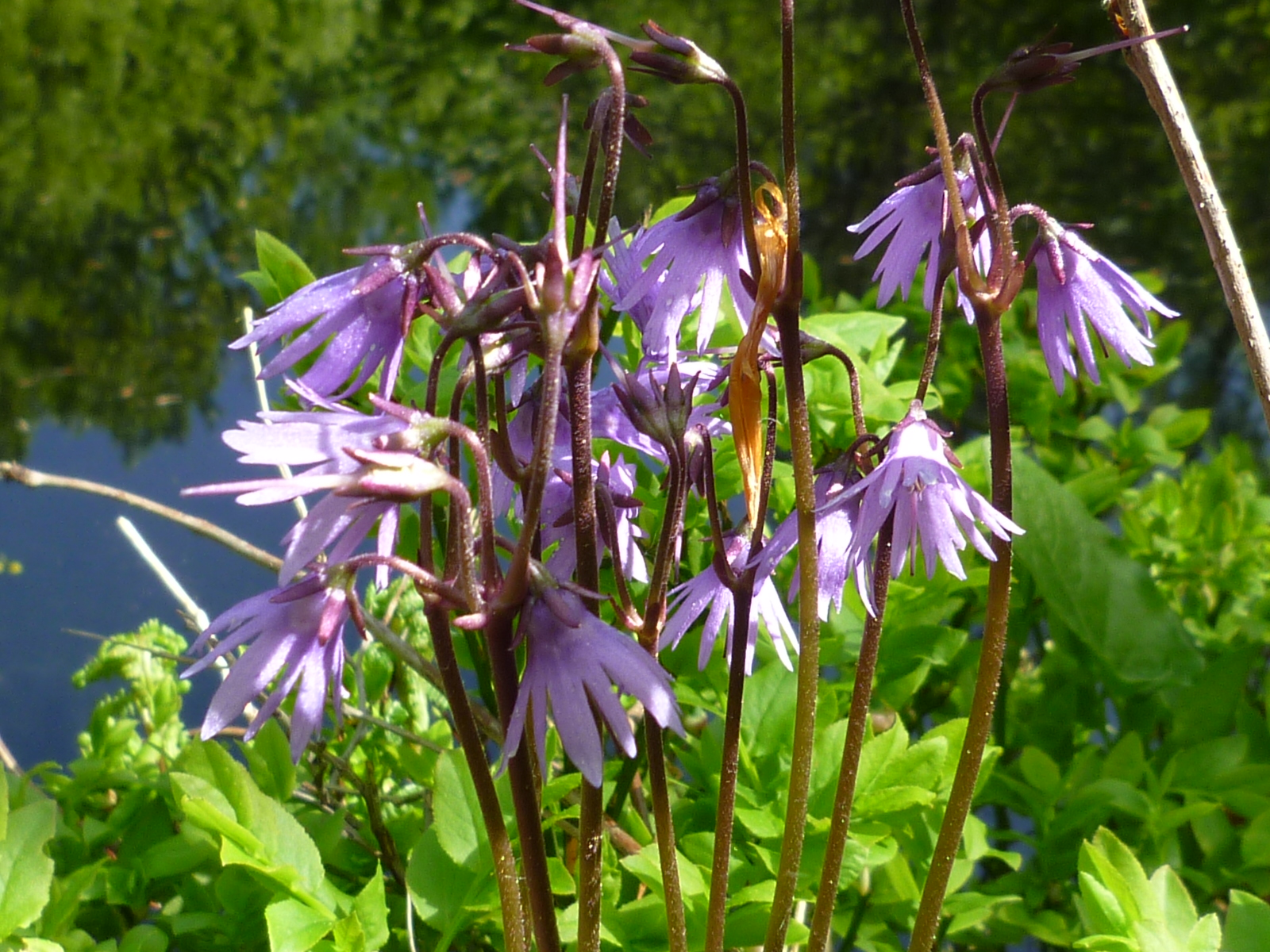 Troddelblume (Soldanella sp.) am Wanderweg zum Lusengipfel, Sagwassertal bei Neuschönau, Nationalpark Bayerischer Wald, Niederbayern